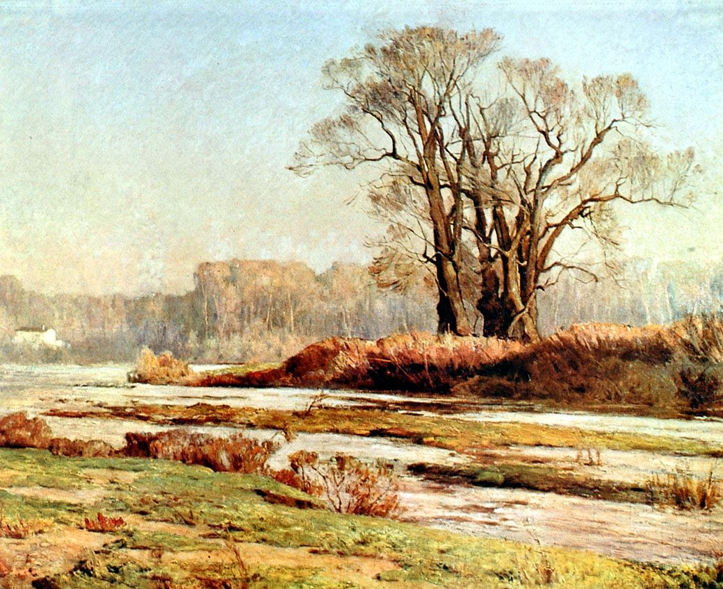 Oleo Riberas del Mapocho